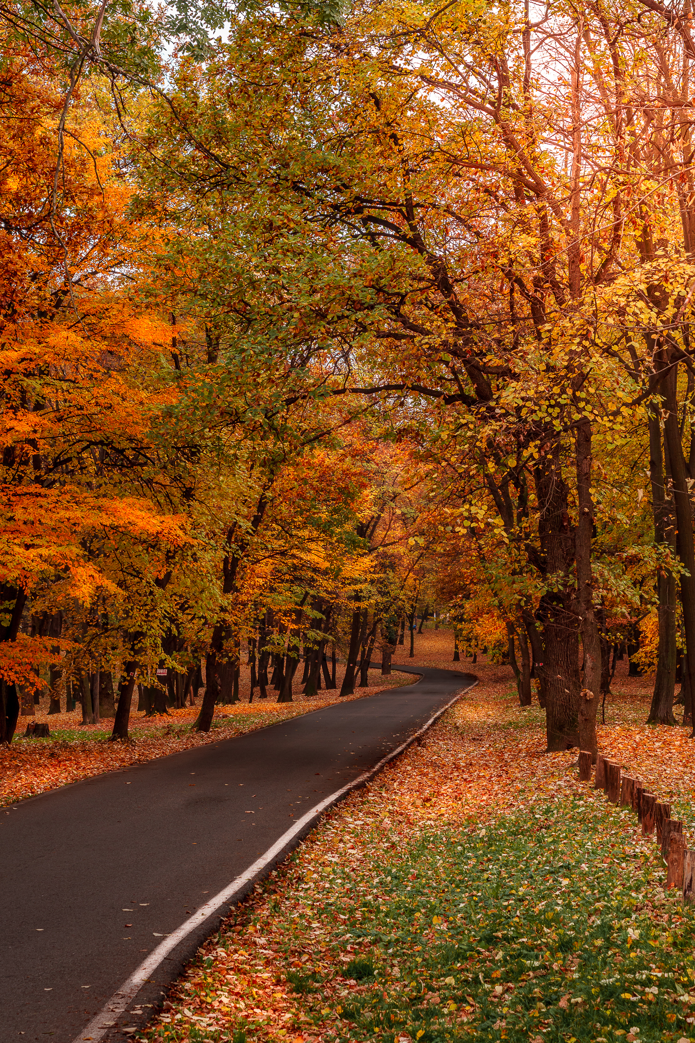 Ово је фотографија заштићеног природног добра у Србији под шифром: СП036This is a a photo of a natural area in Serbia with ID: СП036 Kosutnjak okupan jesenjim bojama